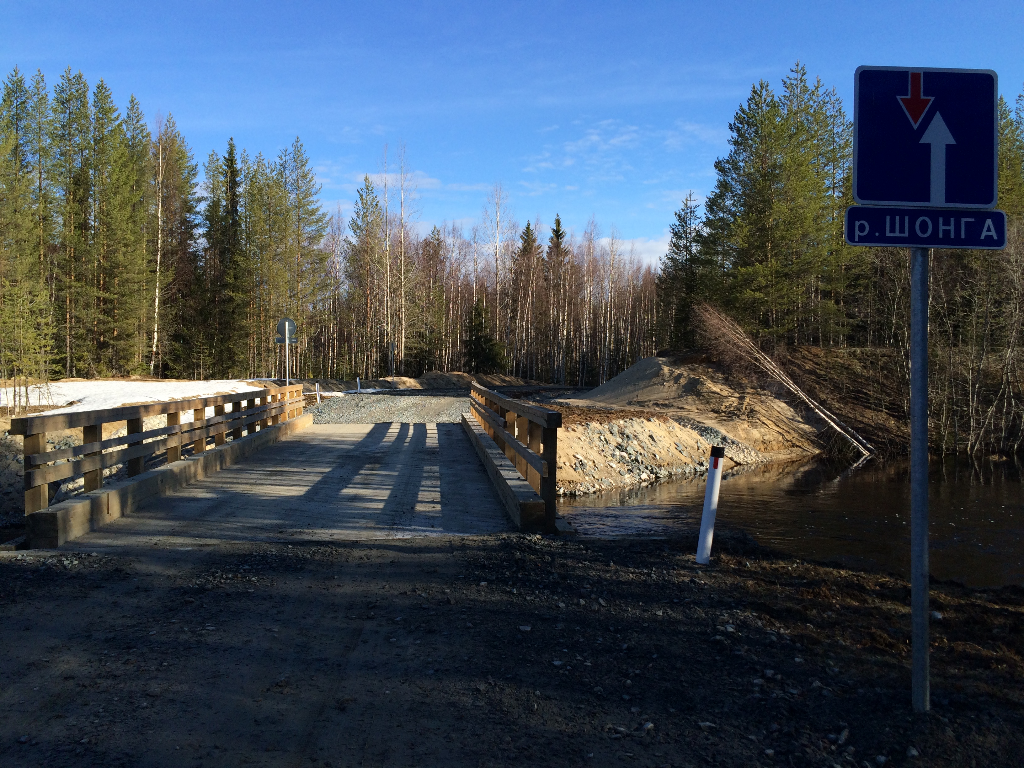 река Шонга